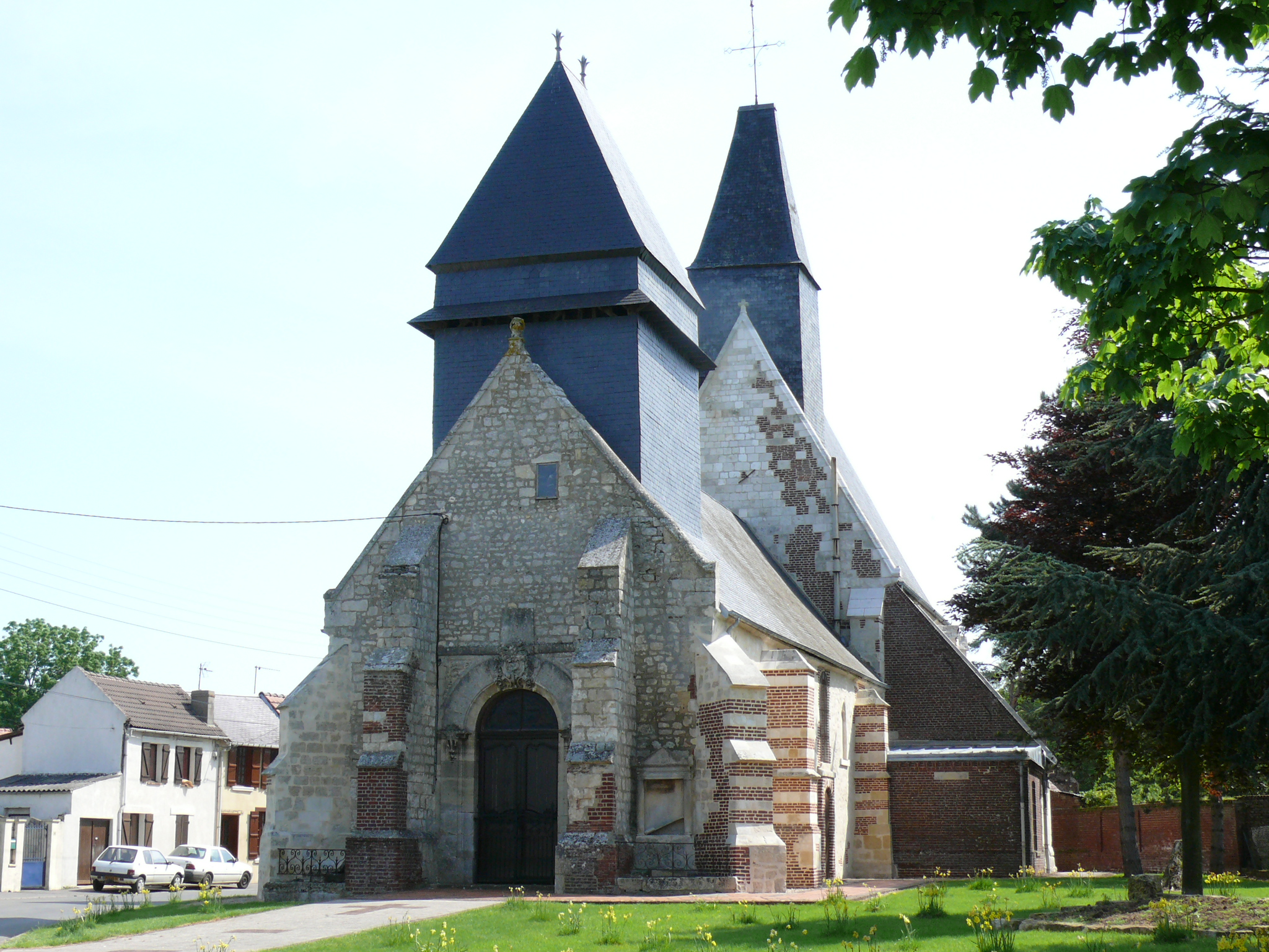 Froissy (Oise - Picardie - France) : L'église Notre-Dame